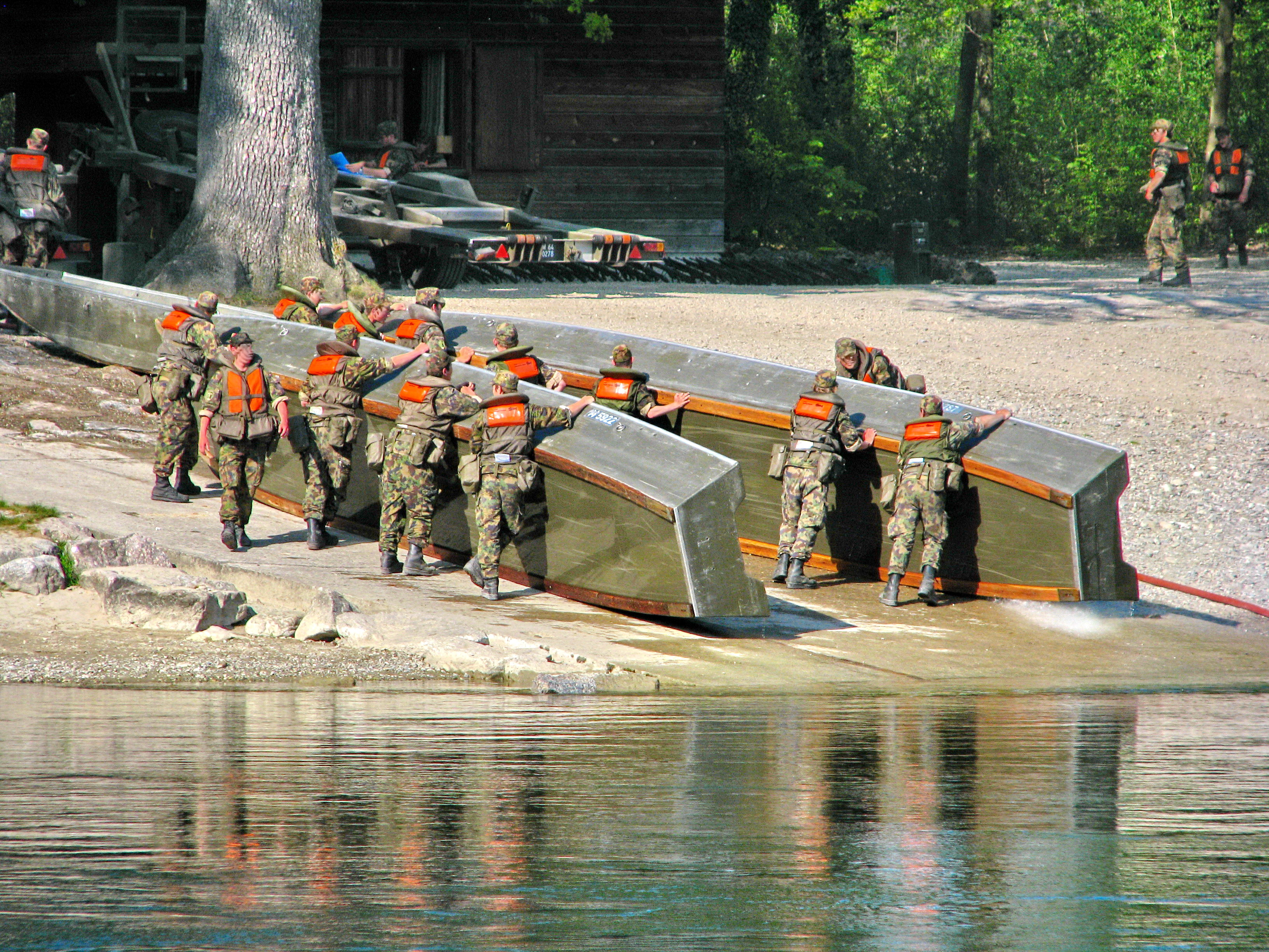 Aaare in Brugg